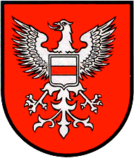 Herb miasteczka Jezierzany